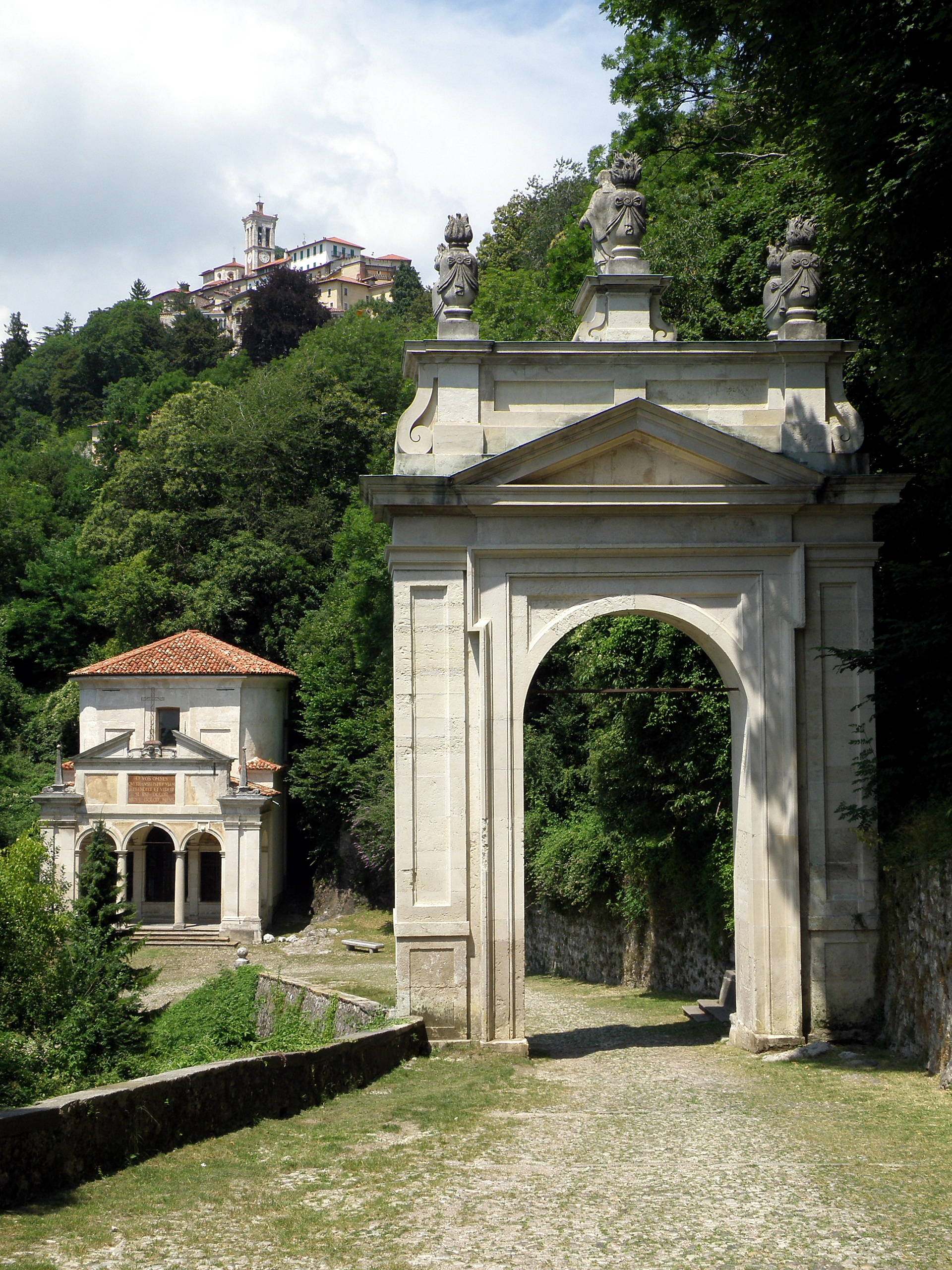 Sacro Monte di Varese. Arco dei misteri gloriosi detto anche Arco di Sant'Ambrogio, ubicato tra la X e la XI Cappella. Sullo sfondo, la X Cappella ed il paese di Santa Maria del Monte.